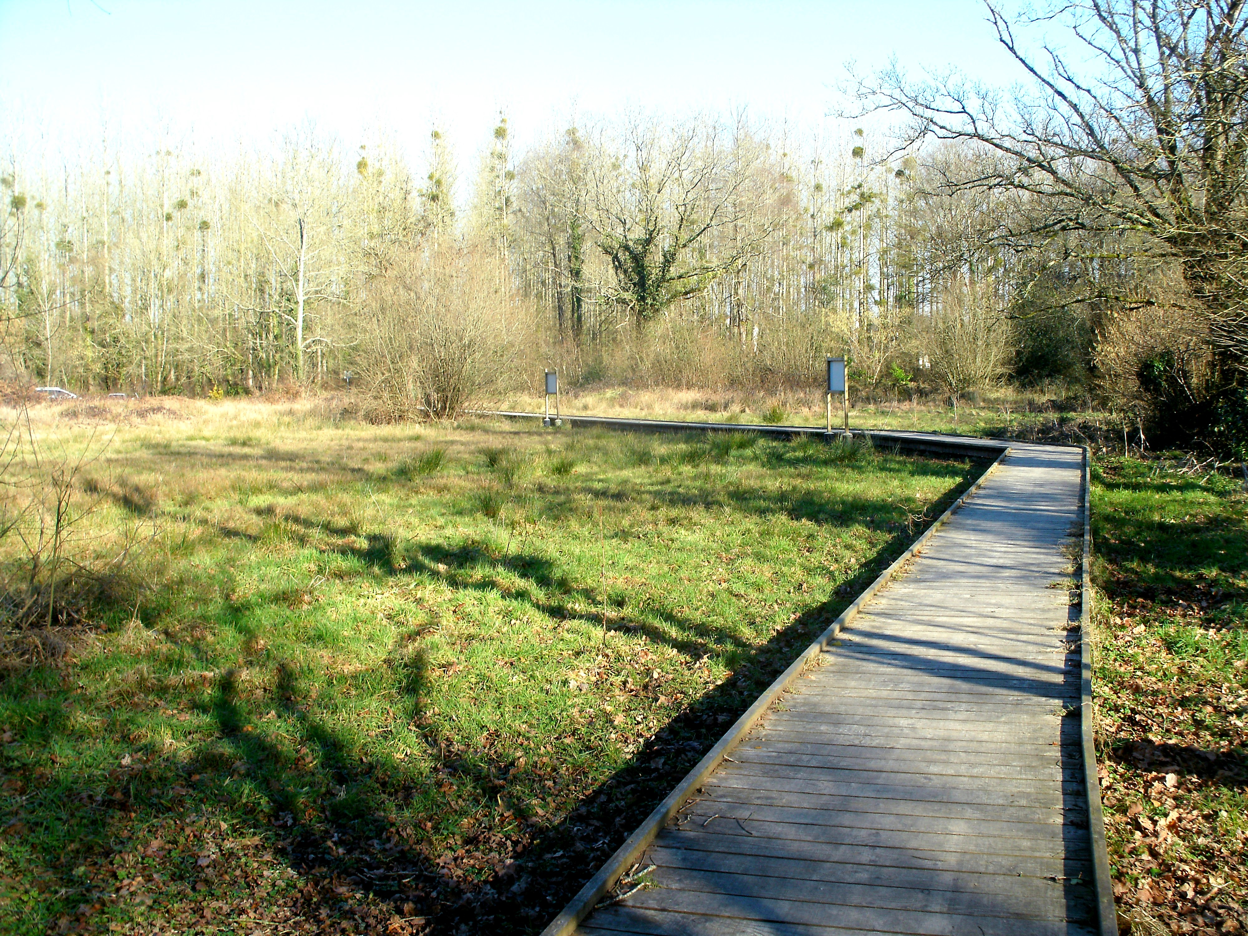 Passerelle traversant une zone humide entre la rue des peupliers et la fontaine de Pont-Bellec.